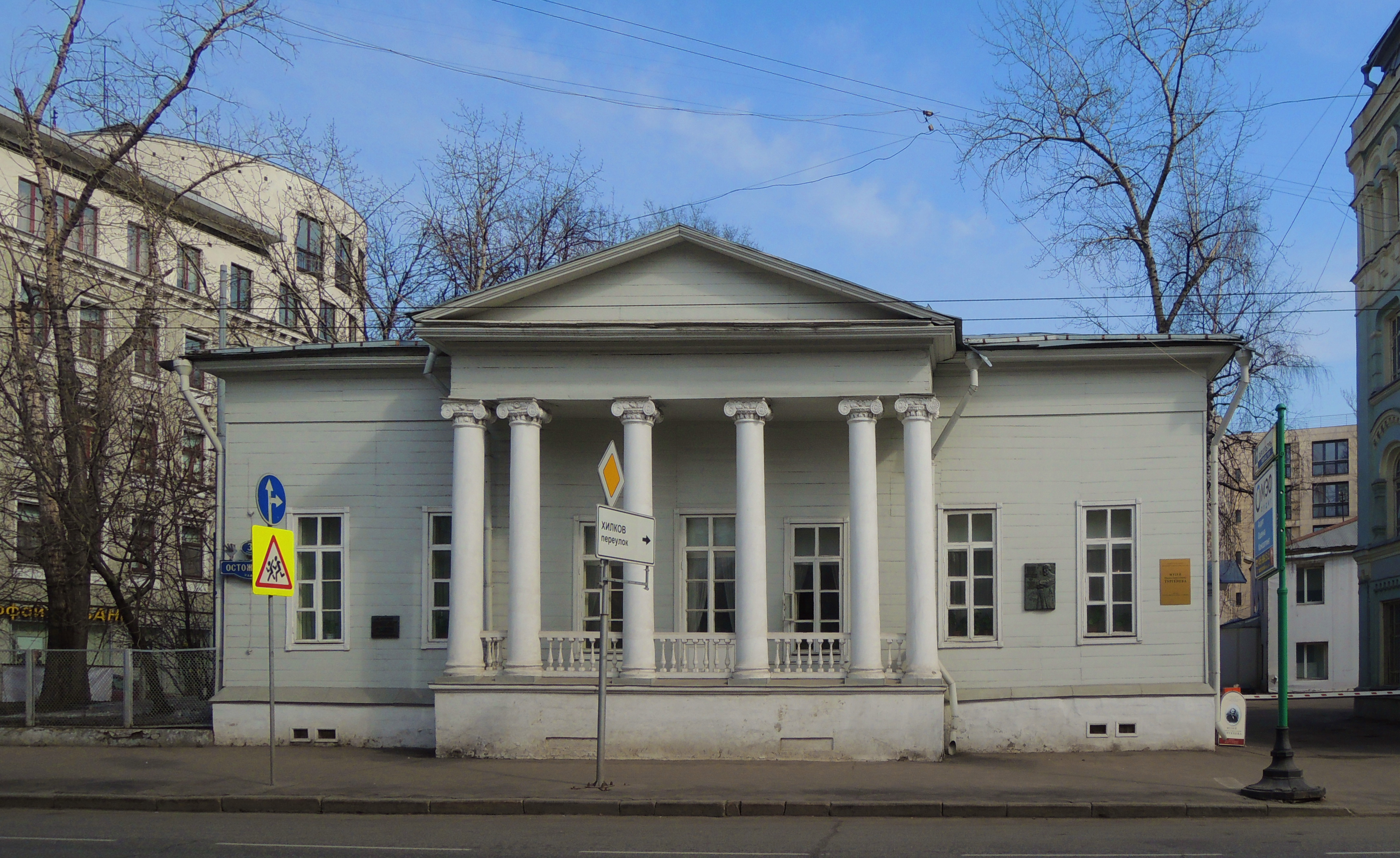 Дом Муму